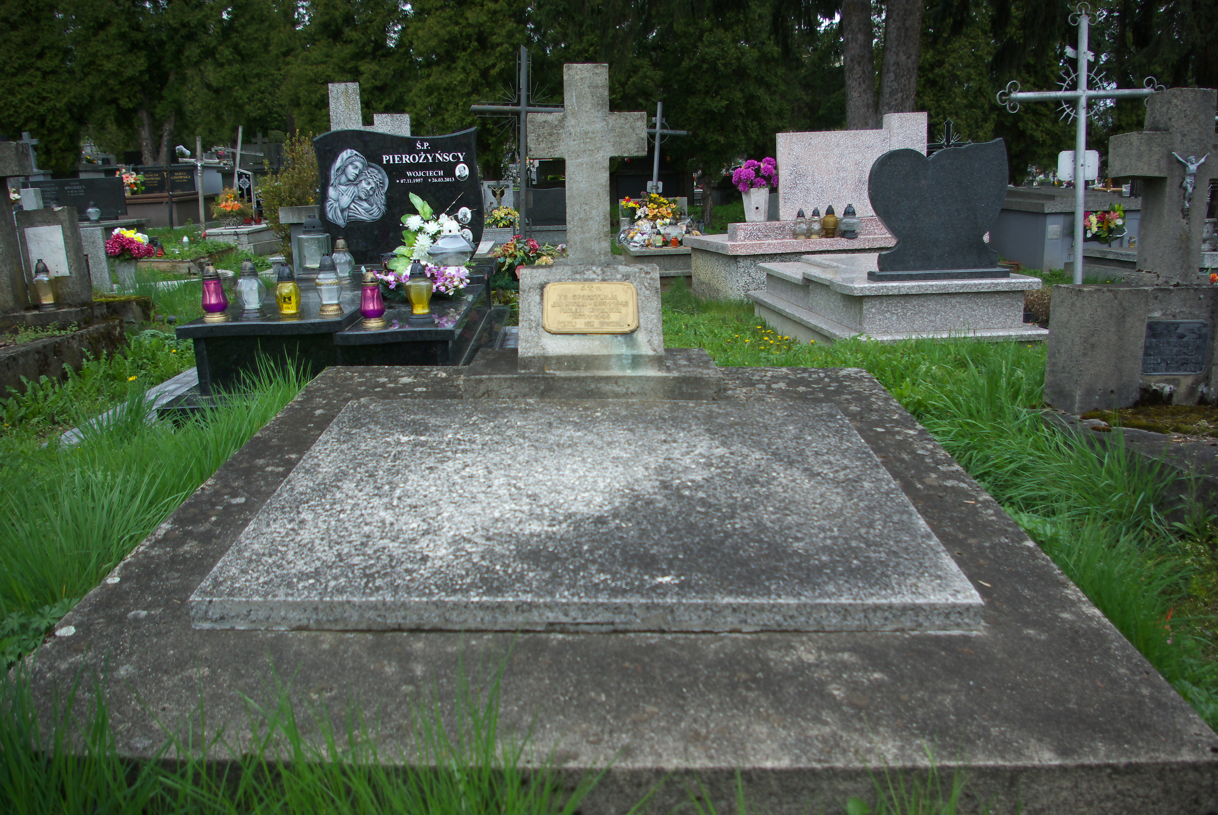 Grobowiec Jana i Pauliny Kosinów w części „Matejki Stary” Cmentarza Centralnego w Sanoku